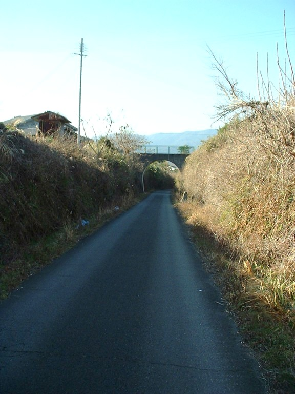 吉野川南岸へと下る五新線掘割